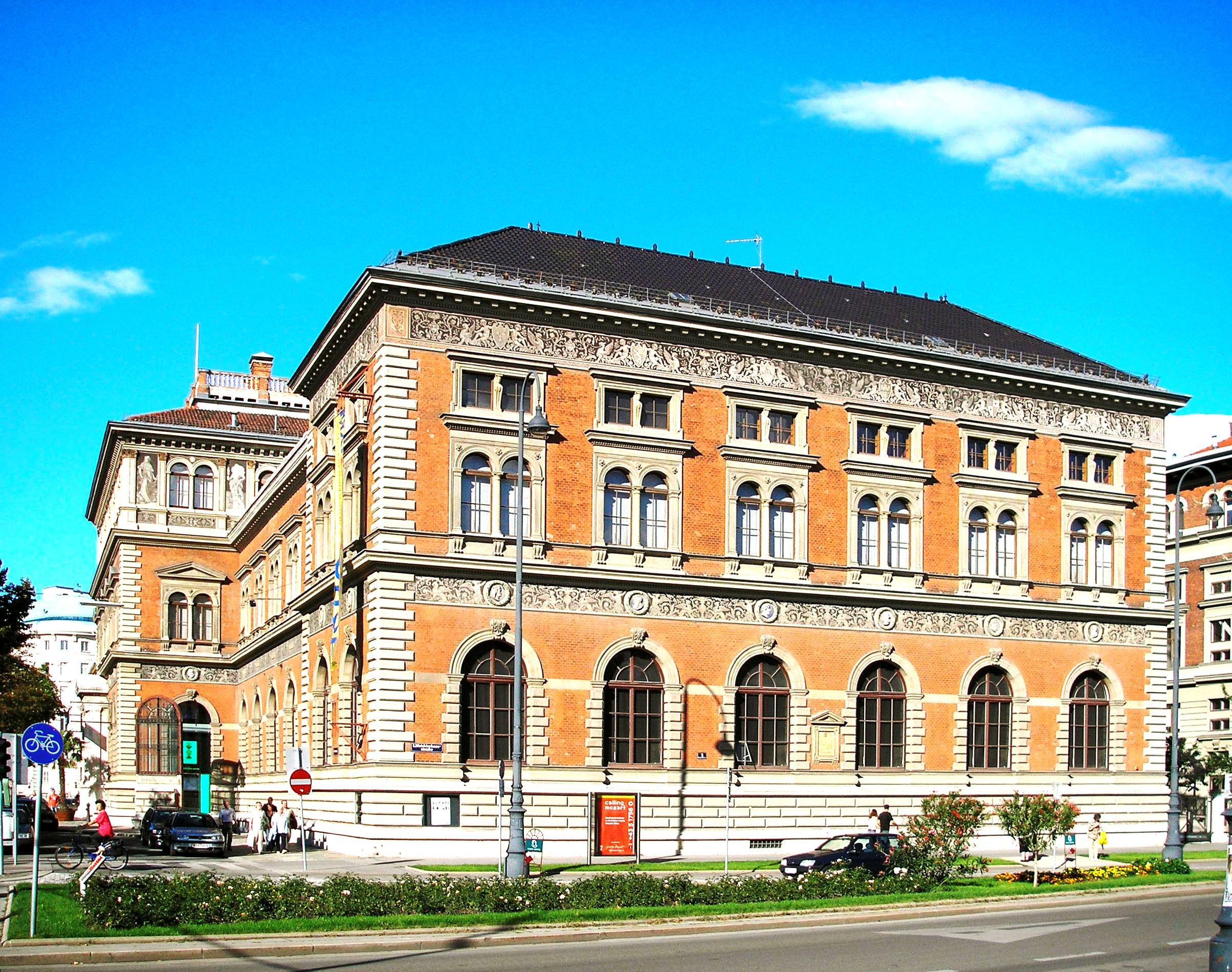 The Österreichisches Museum für angewandte Kunst (Museum of Applied Arts, or MAK) in Vienna.